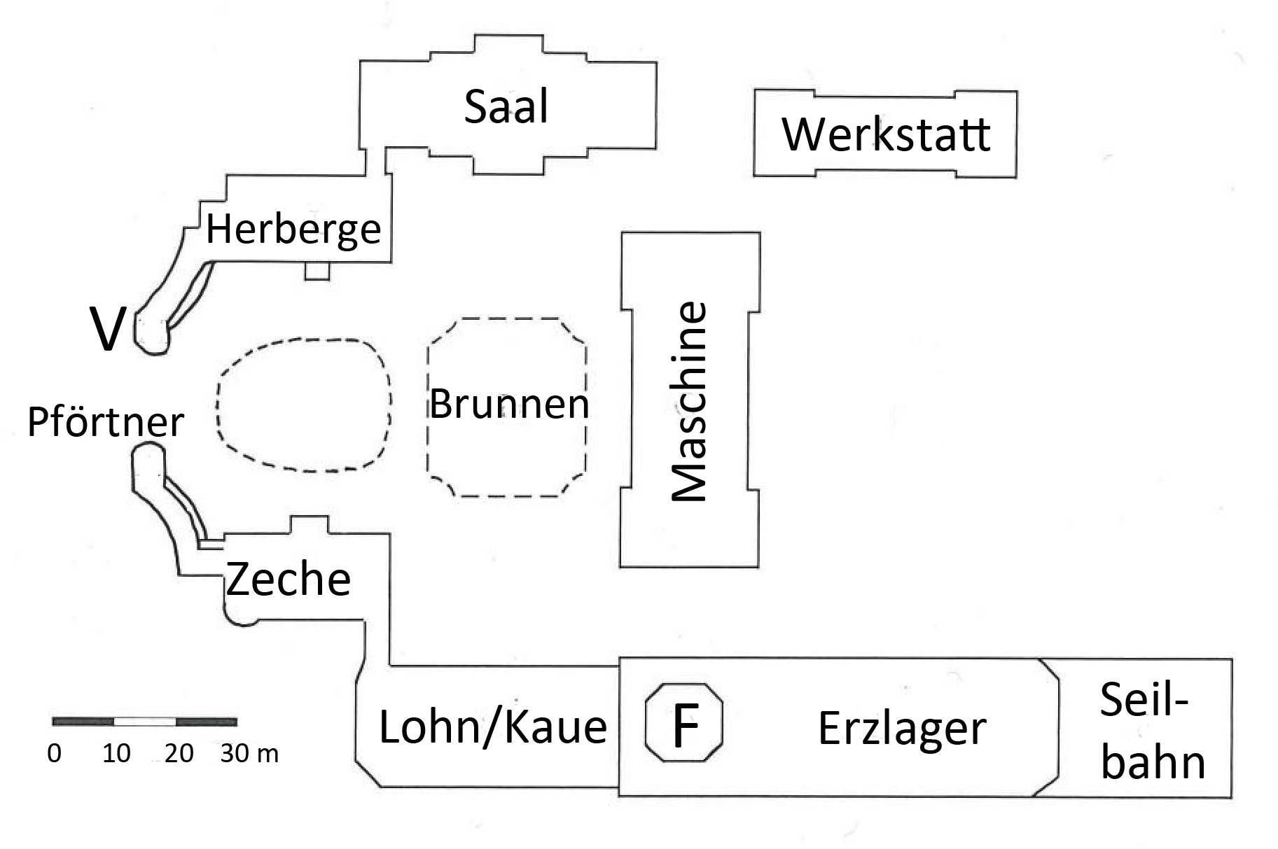 Grube Dr. Geier (Grube Amalienhöhe). Grundriss Tagesanlagenː F=Förderturm, Maschine=Maschinenhaus, V=Verbandspavillon. Angaben entnommenː Klempː Grube Dr. Geier, Verlag Biebertal, 1987, ISBN 3-9801447-0-4, S. 86.